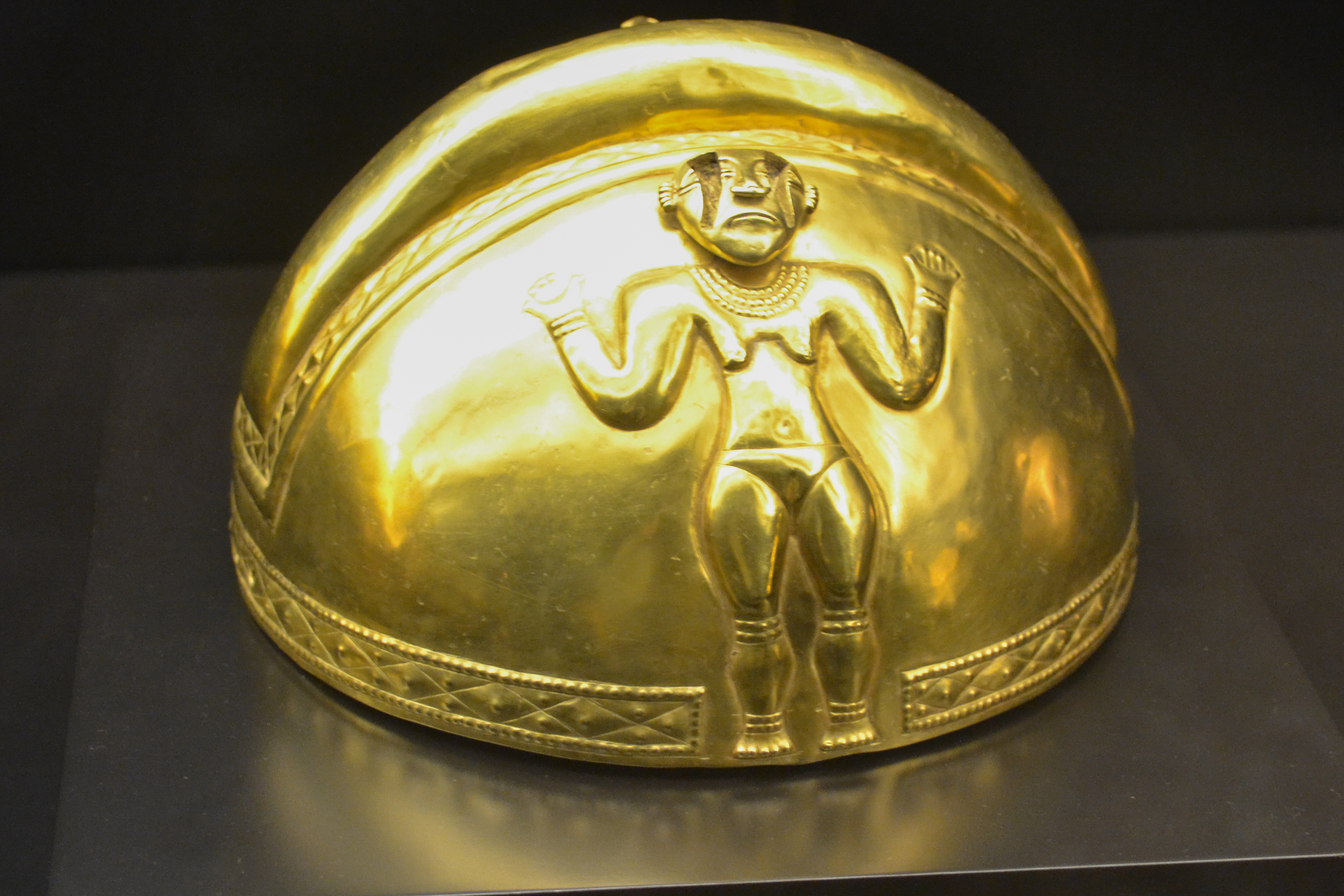 Casco de oro Quimbaya semiesférico decorado con un abultamiento longitudinal en su parte central. A ambos lados de éste aparecen dos figuras humanas. 250-430 d. C. Altura: 12 cm; diámetro máximo: 19,30 cm; peso: 522 g. Nº inv. 17428. Museo de América.